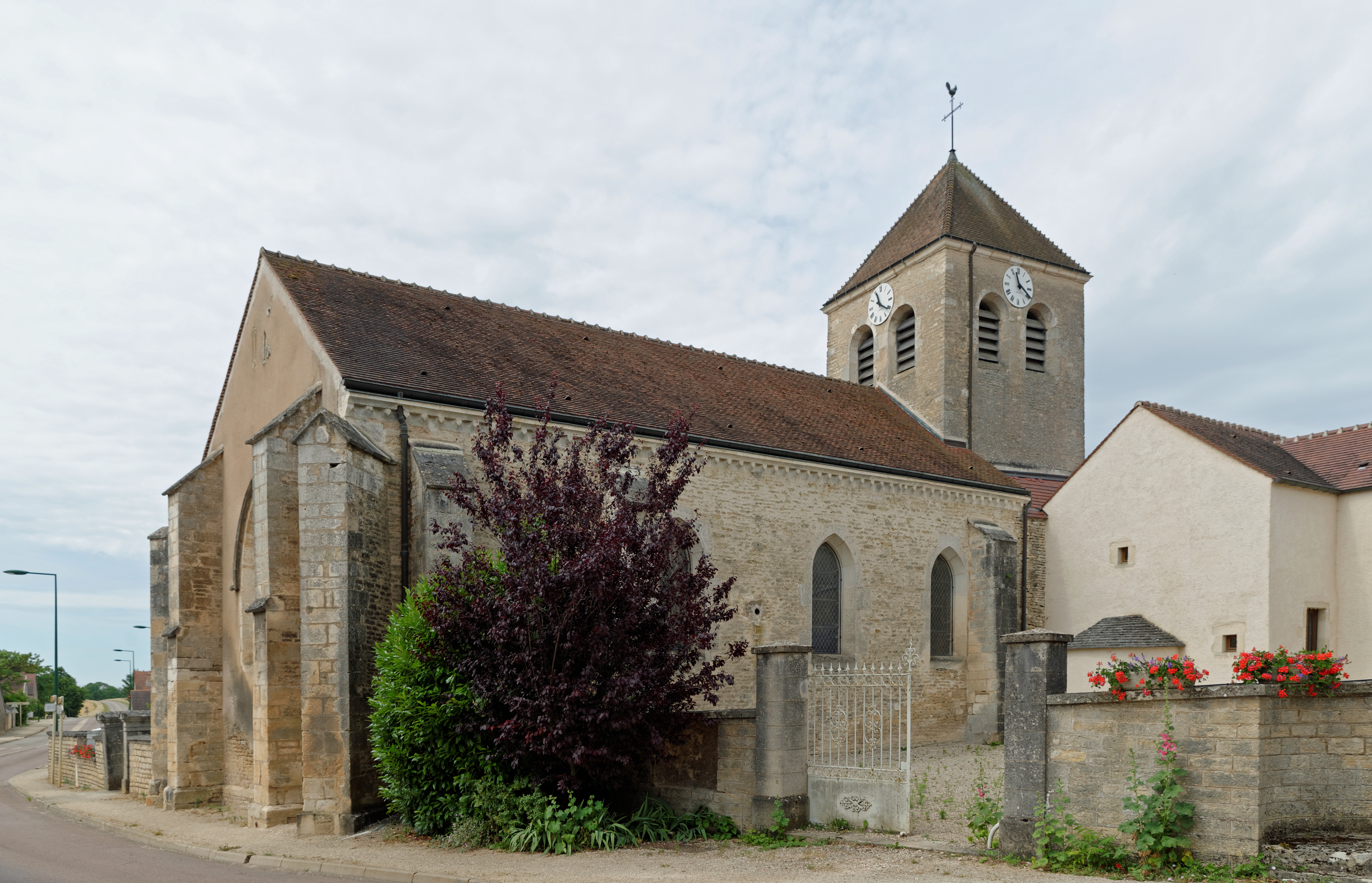 Église Saint-Bénigne à Épagny (Côte-d'Or, Bourgogne, France)